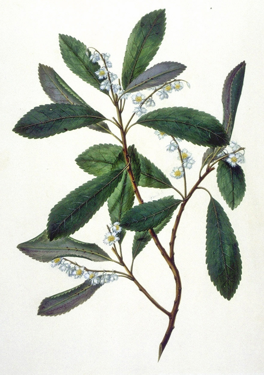 Elaeocarpus dentatus (Elaeocarpaceae), Hīnau tree, New Zealand.